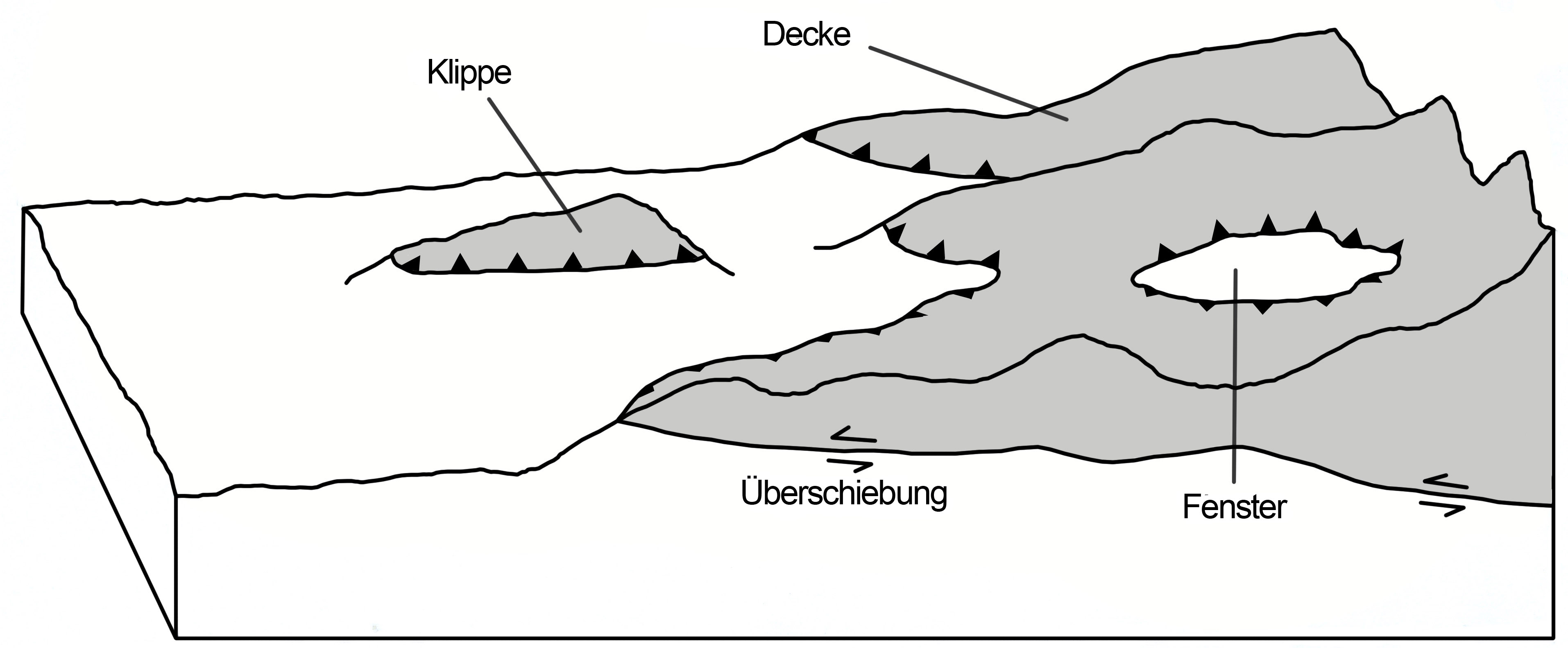 Geologische Strukturen im Gelände bei einer Überschiebung. Andere Versionen: Image:Overschuiving systeem.jpg (Holländisch); Image:Thrust system en.jpg (Englisch)